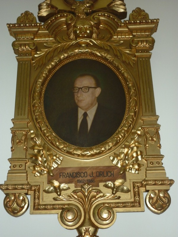 Francisco J. Orlich, Presidente de Costa Rica 1962-1966